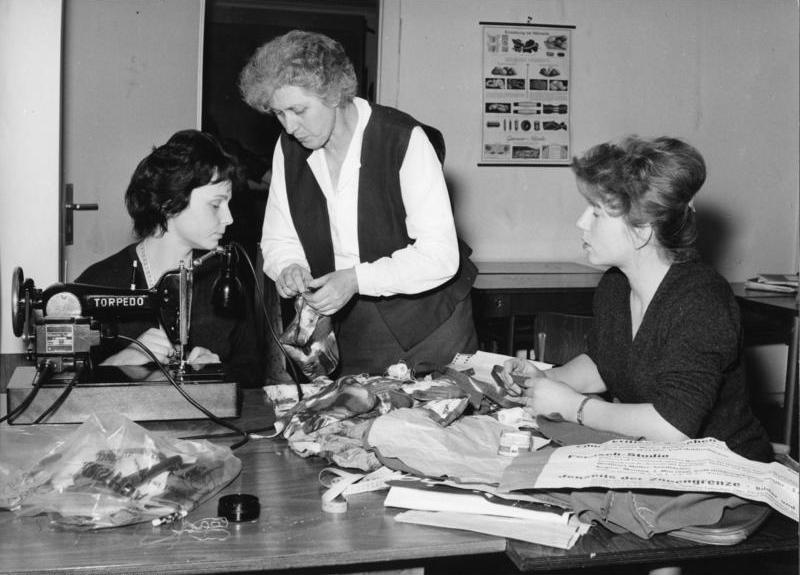 Volkshochschule Frankfurt Zuschneidekursus für Fortgeschrittene